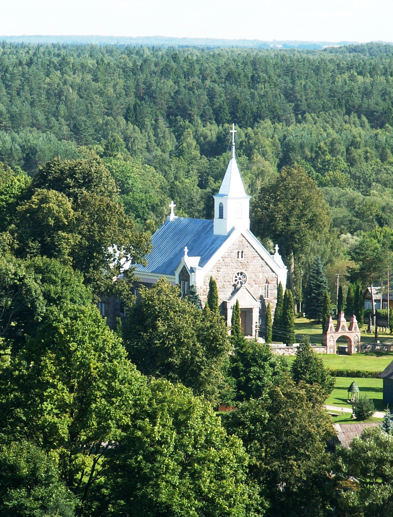 Autorius Saulius Rasalas